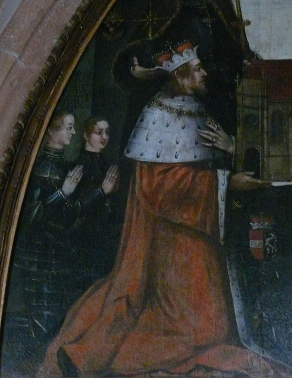 Klášter Neuberg - obraz fundátora Oty Habsburského se syny